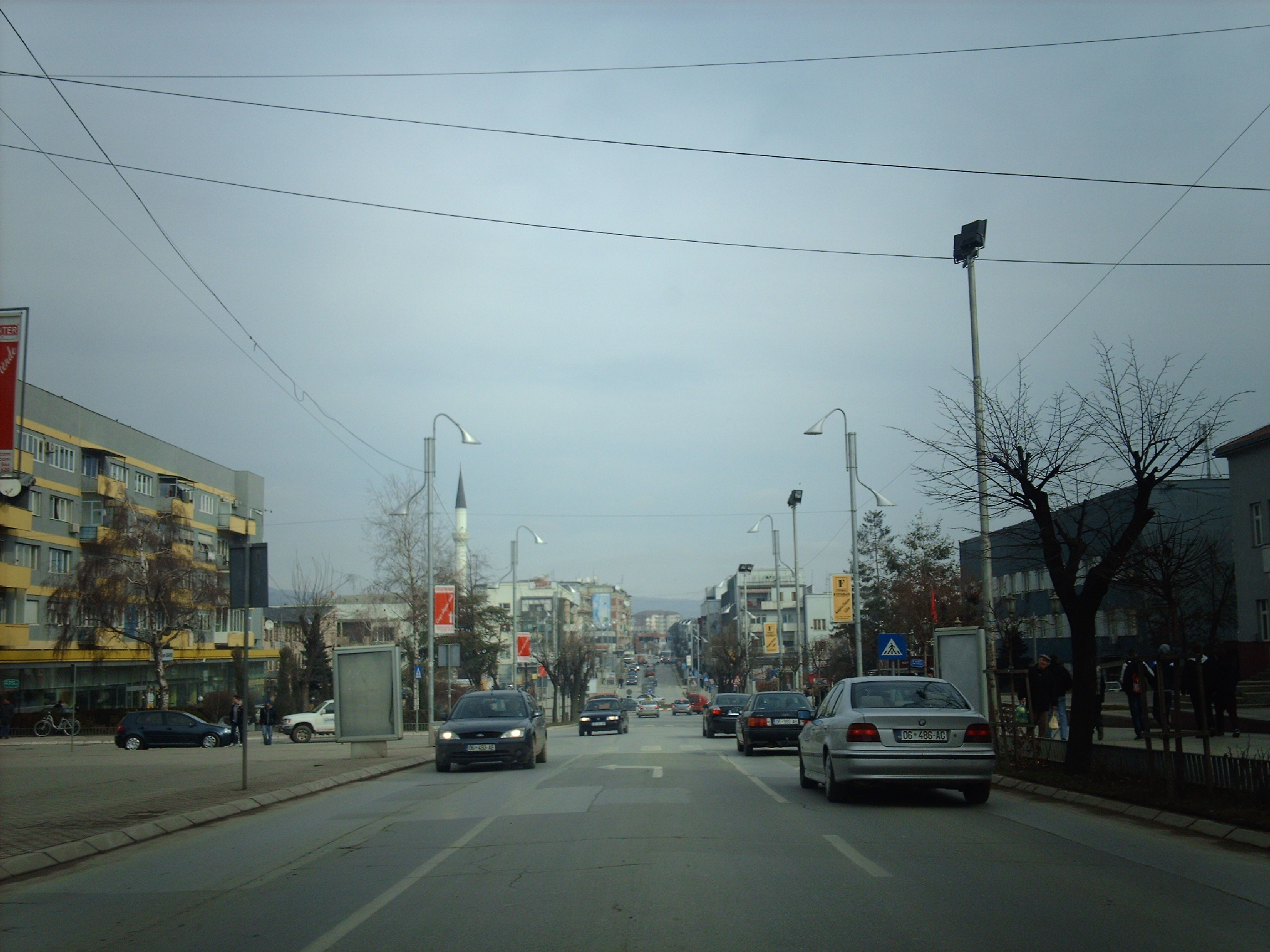 pjes e Qytetit te gjilanit afer teatrit